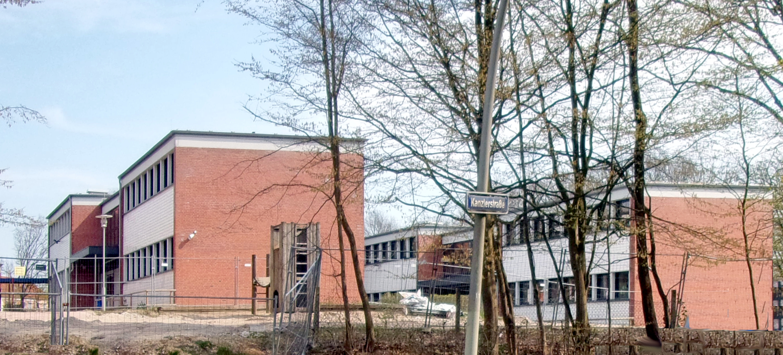 Grundschule Rönneburg im Bezirk Harburg, Kanzlerstraße in Rönneburg, Ansicht beschnitten, Fahrzeuge entfernt.